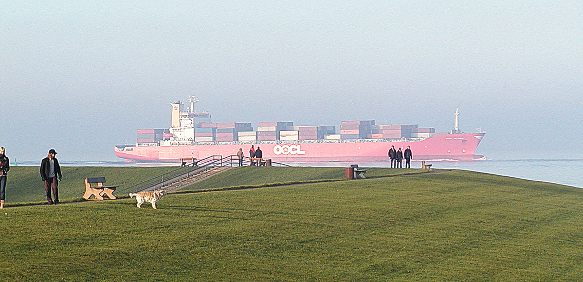 Am Deich in Otterndorf